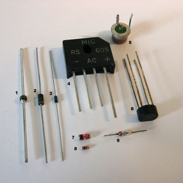 Foto på olika typer av dioder BYM56C 95A 2500V , likriktardiod 1N4002, likriktardiod 1N4448, lågstöms switchdiod RS605, likriktarbrygga 1N5000, likriktardiod B80C1500, likriktarbrygga Ytmonterbar diod Ytmonterbar diod OA90, germaniumdiod Fotograf: Daniel Ryde, Skövde 2004-08-28 Licens